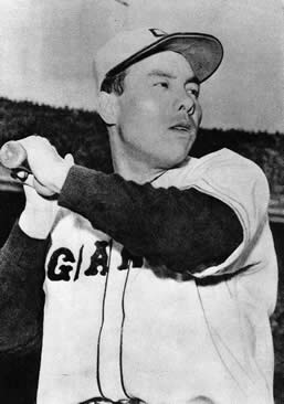 選手時代の千葉茂